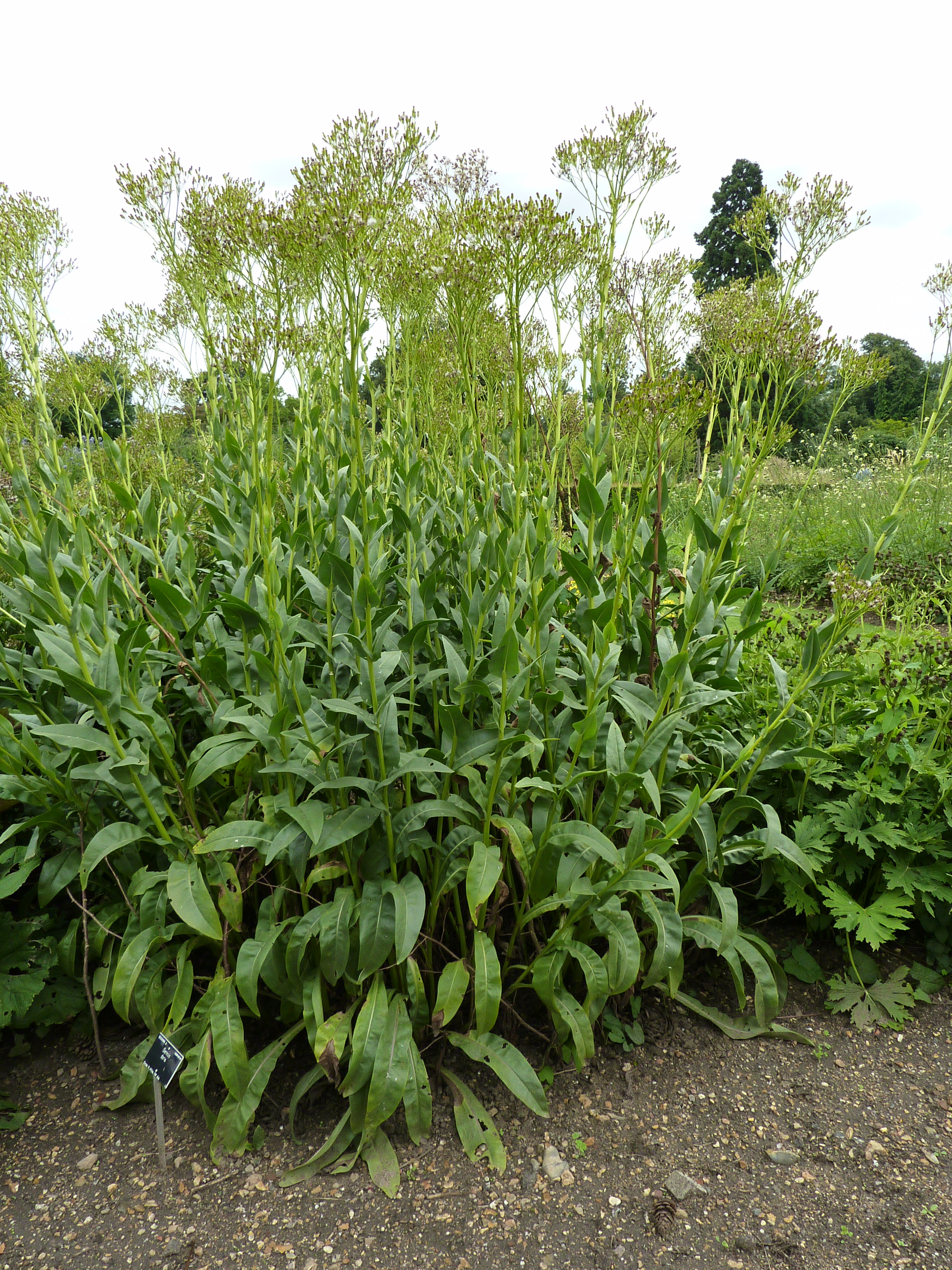 Senecio doria, Cambridge University Botanic Garden